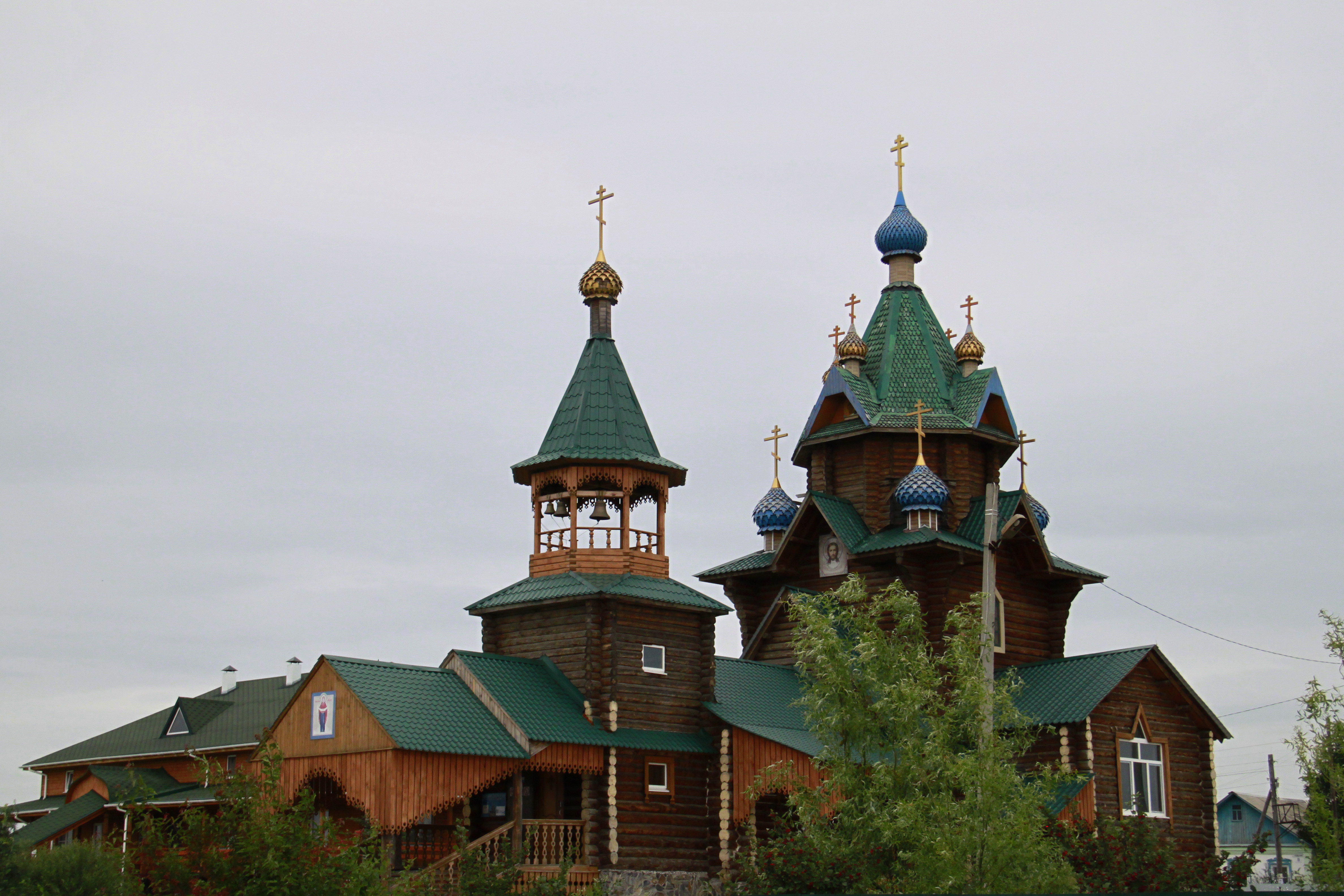 Храм «Покрова Пресвятой Богородицы», Южноуральск